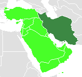 Иран (тёмно-зелёный) на карте Ближнего Востока (светло-зелёный)